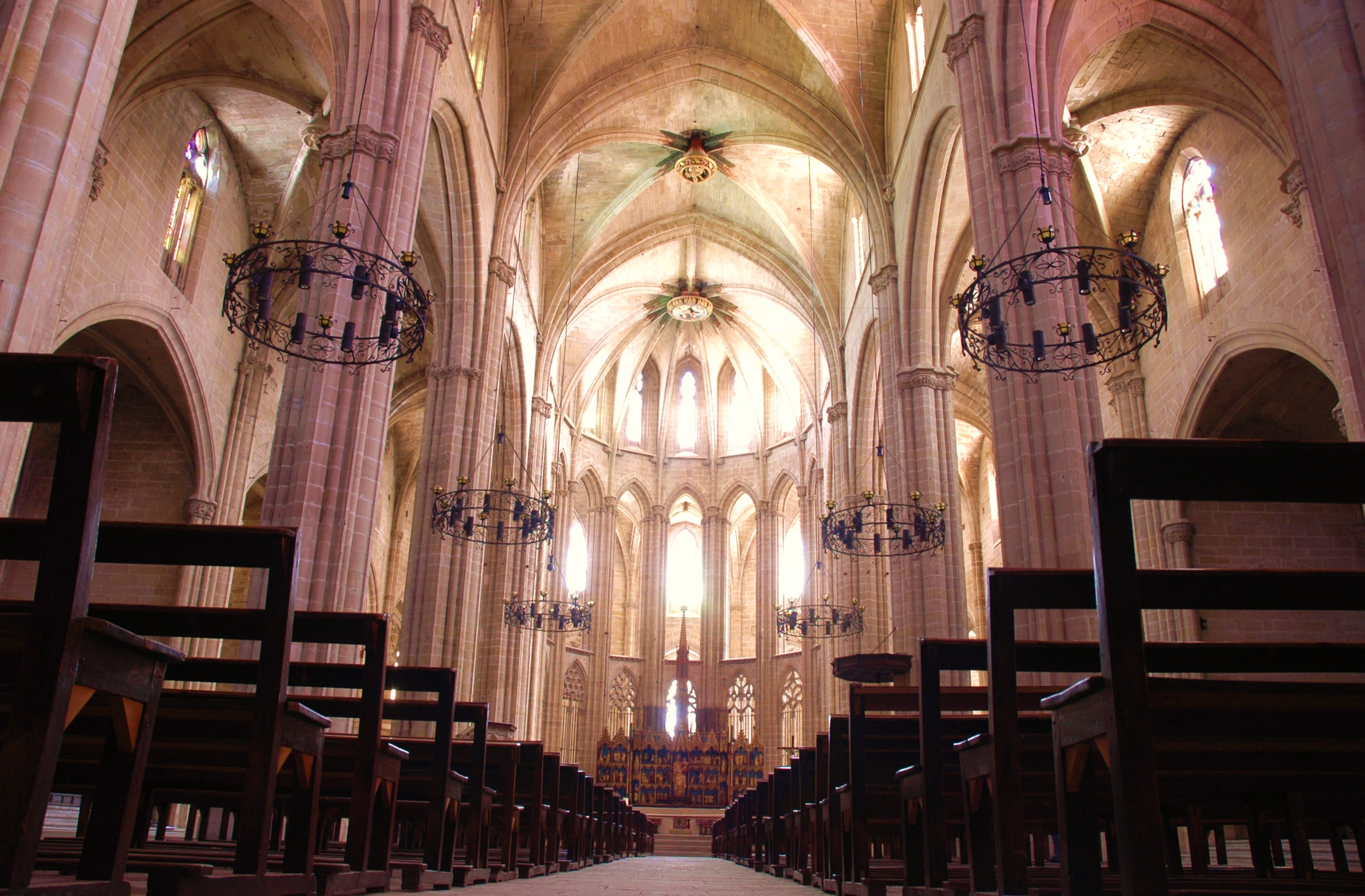 Catedral de Tortosa - Nau central